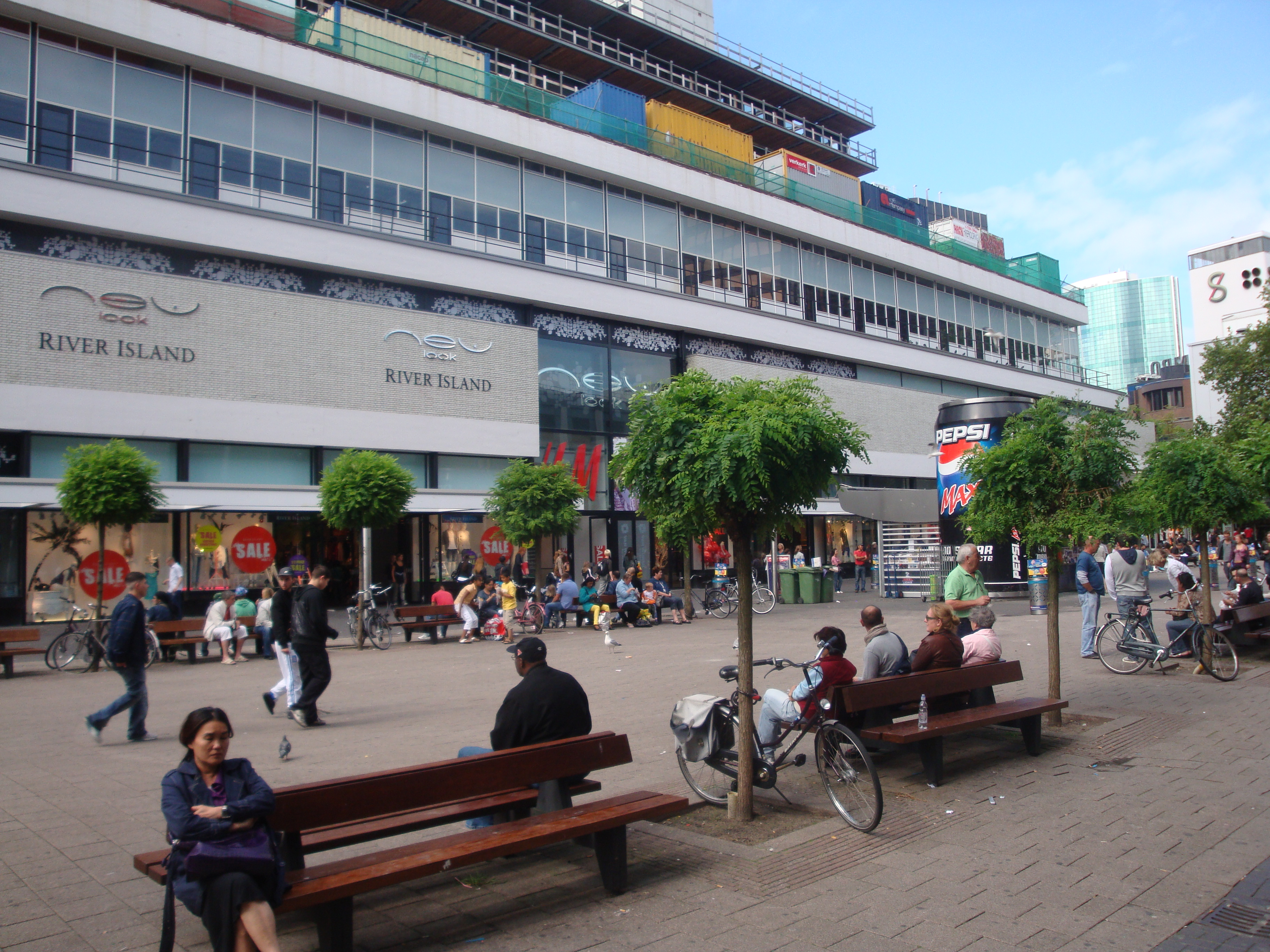 Binnenwegplein